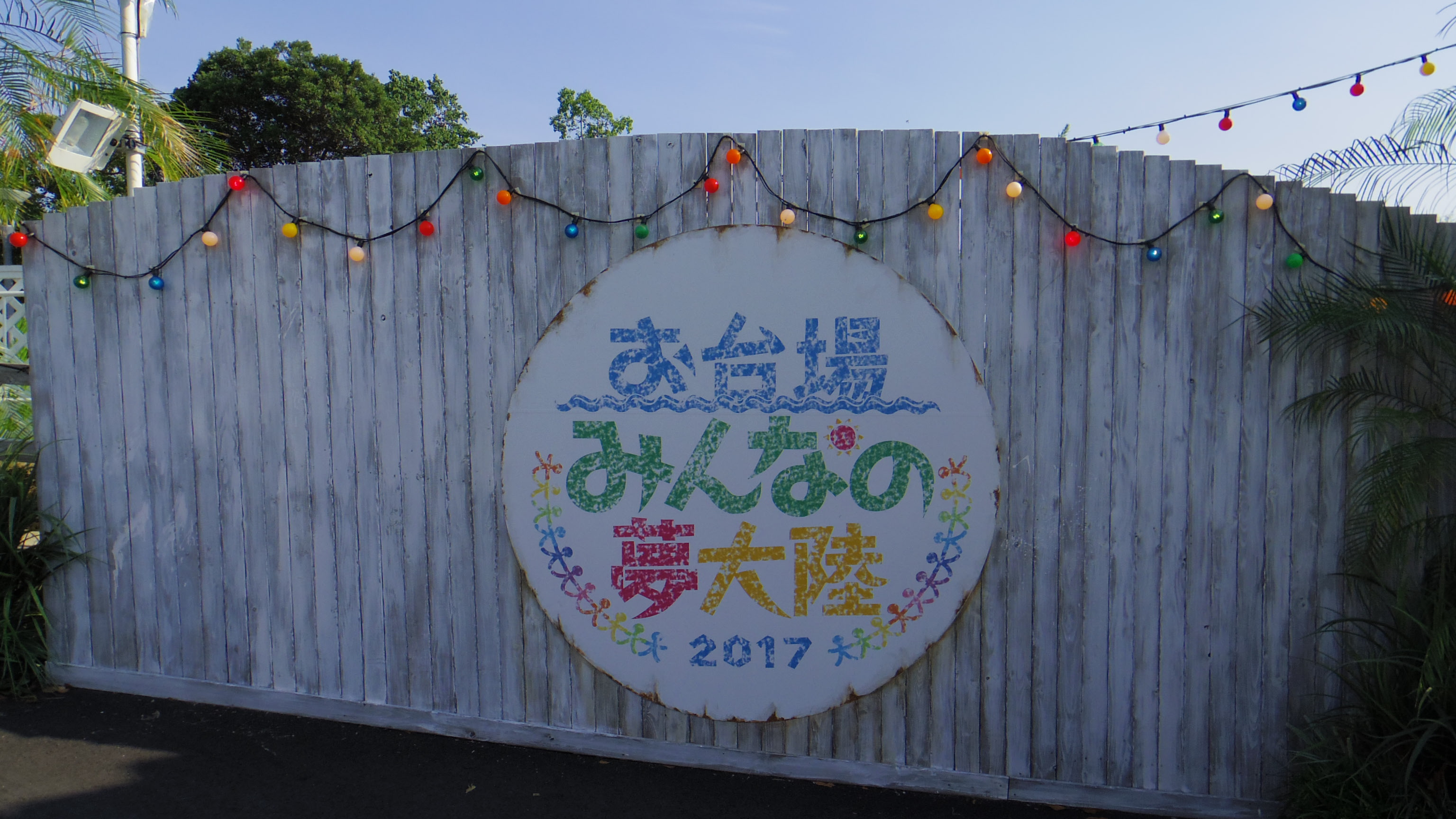 「お台場みんなの夢大陸2017」のロゴ看板。「スマイルランド」メインゲートより。2017年8月27日撮影。